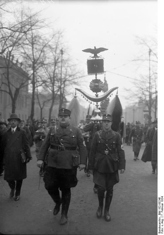 Der nationalsozialistische Studentenbund Unter den Linden in Berlin.